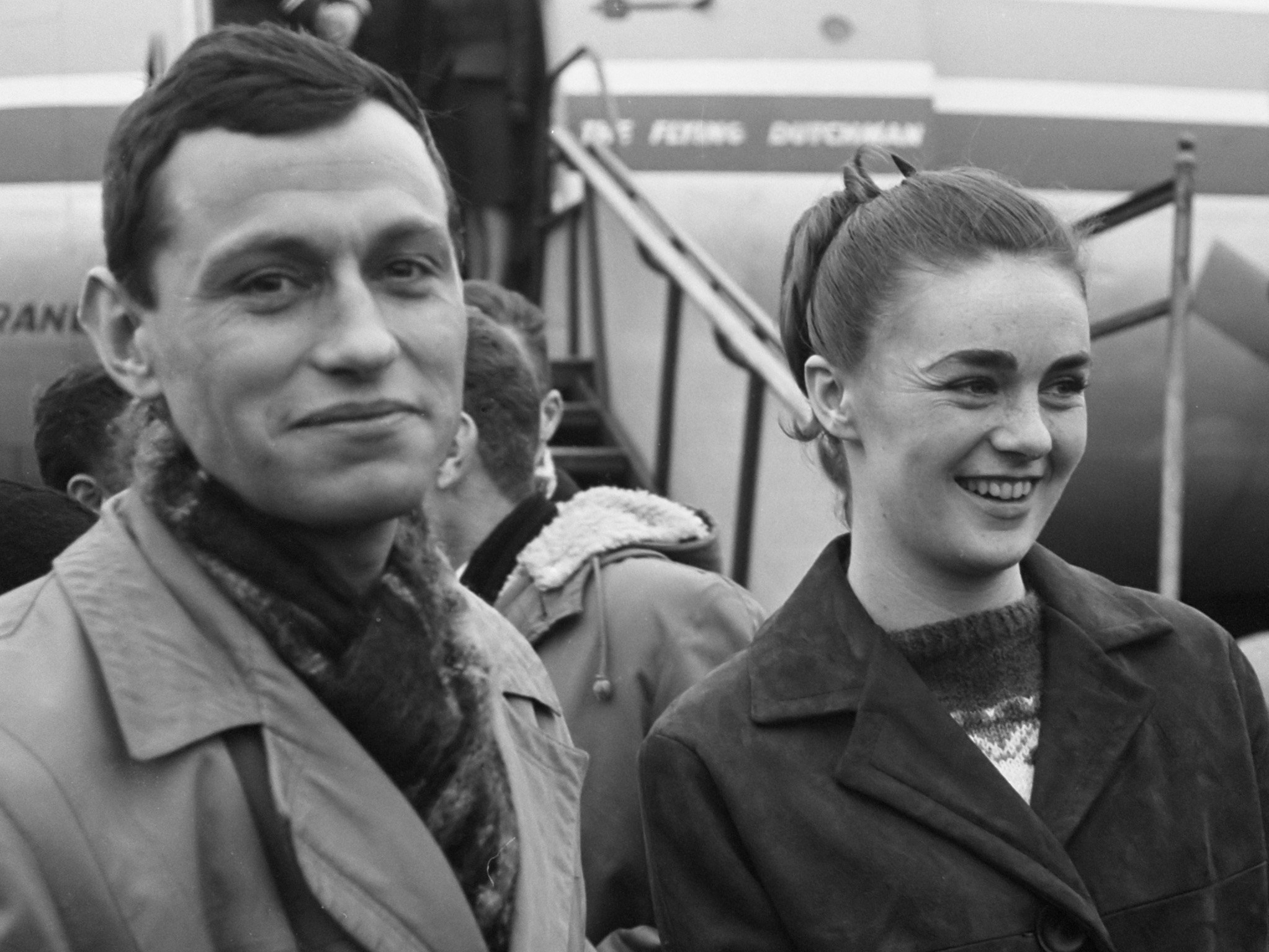 Aankomst van der Grift op Schiphol met verloofde 19 februari 1962